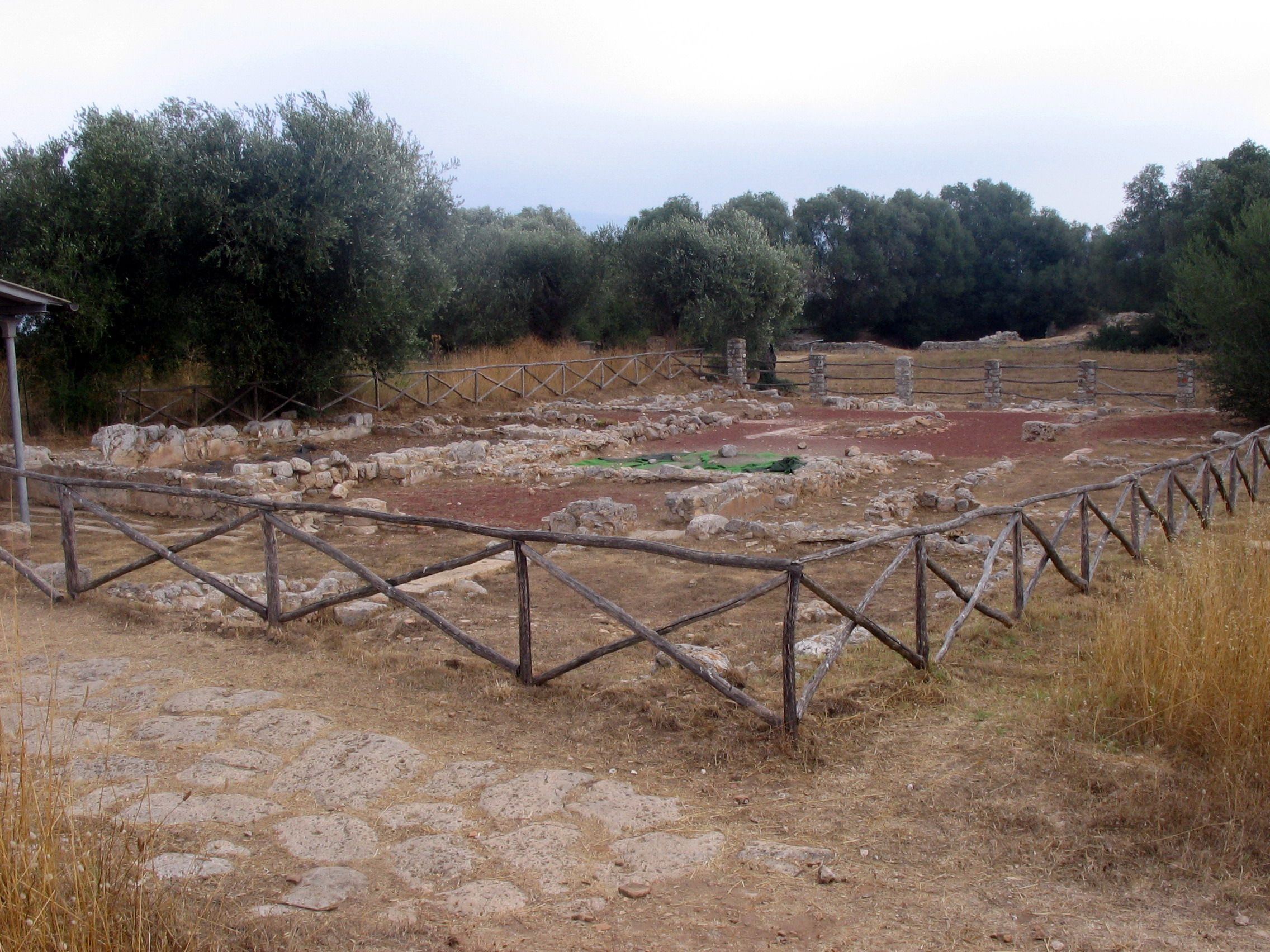 Cosa, Ansedonia, Orbetello, Toscana, Italia